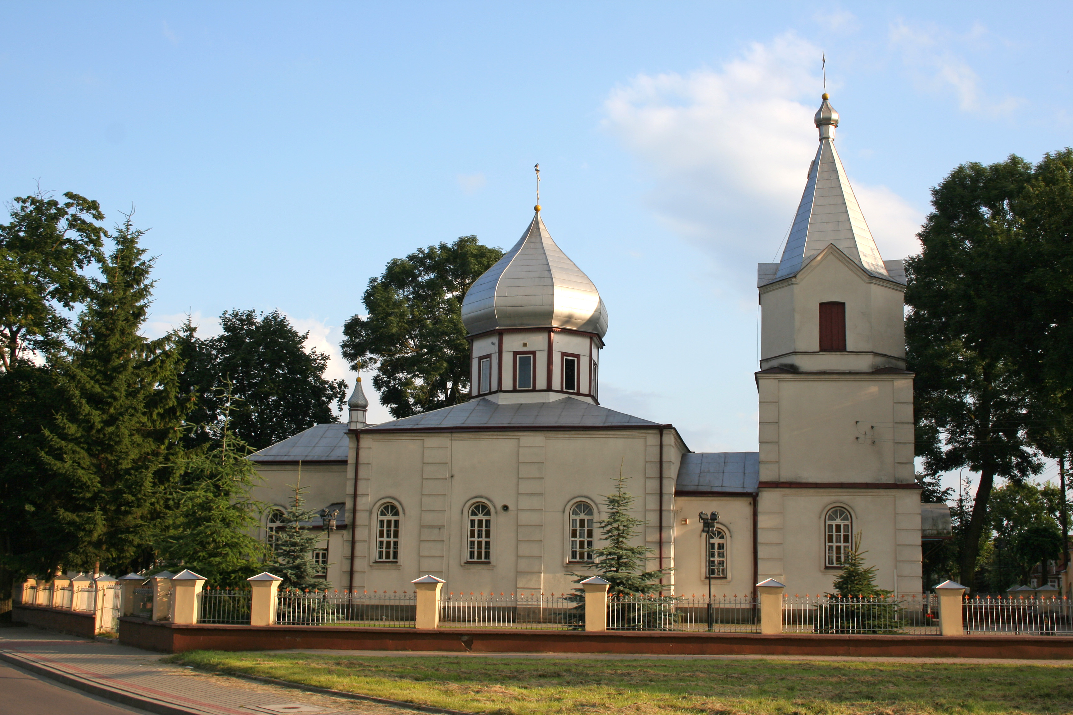 Cerkiew Zmartwychwstania Pańskiego w Bielsku Podlaskim.